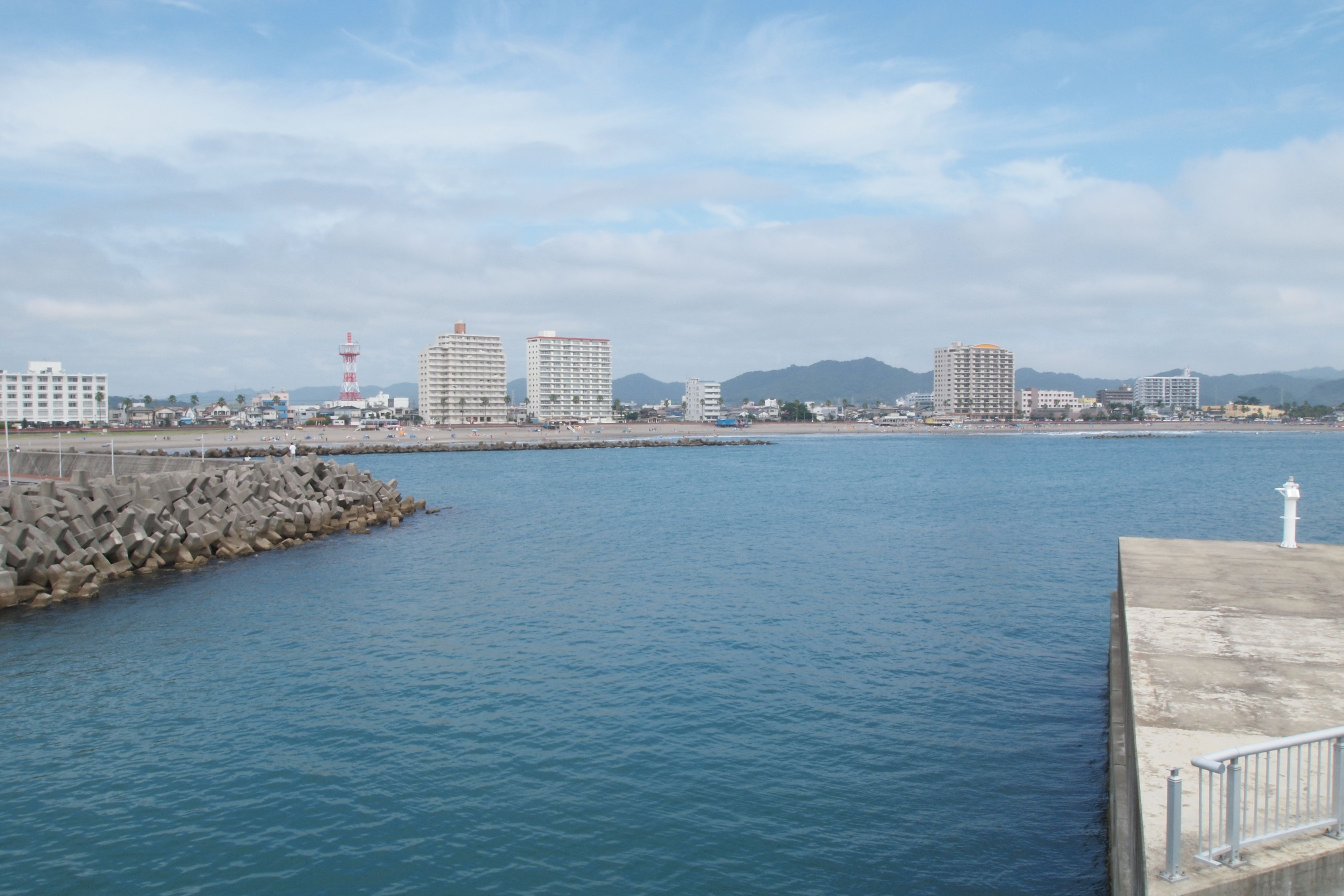 鴨川港からの風景